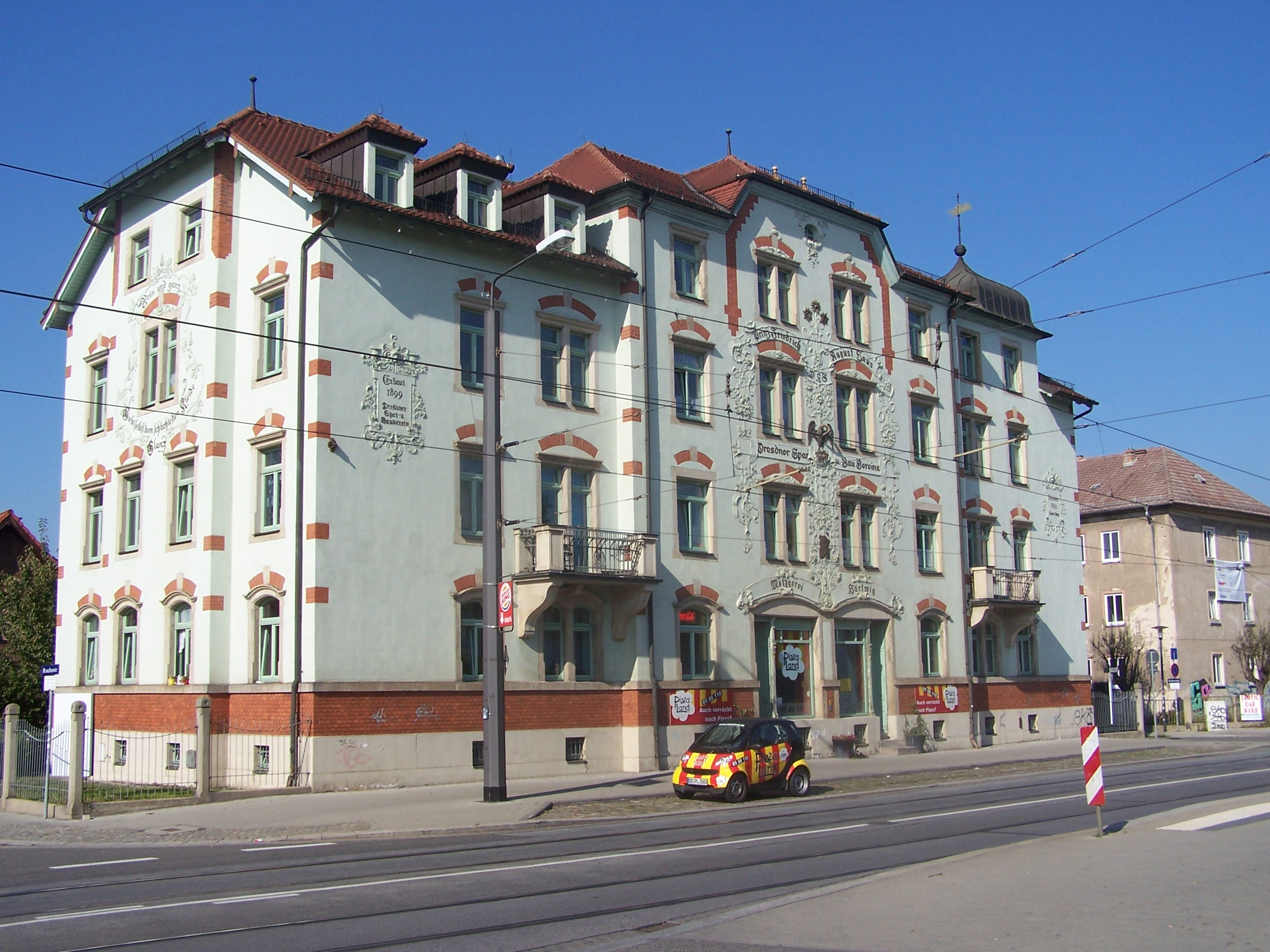 Friedrich-August-Haus in Dresden-Neukaditz (an der Leipziger Straße), erstes Haus des Dresdner Spar- und Bauvereins. Siehe auch: Image:Dresden FriedrichAugustHaus2.jpg